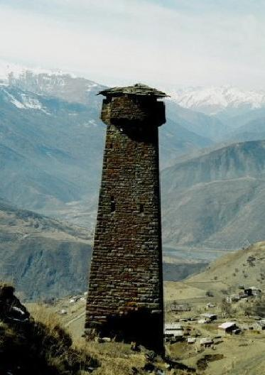 Тазбичи